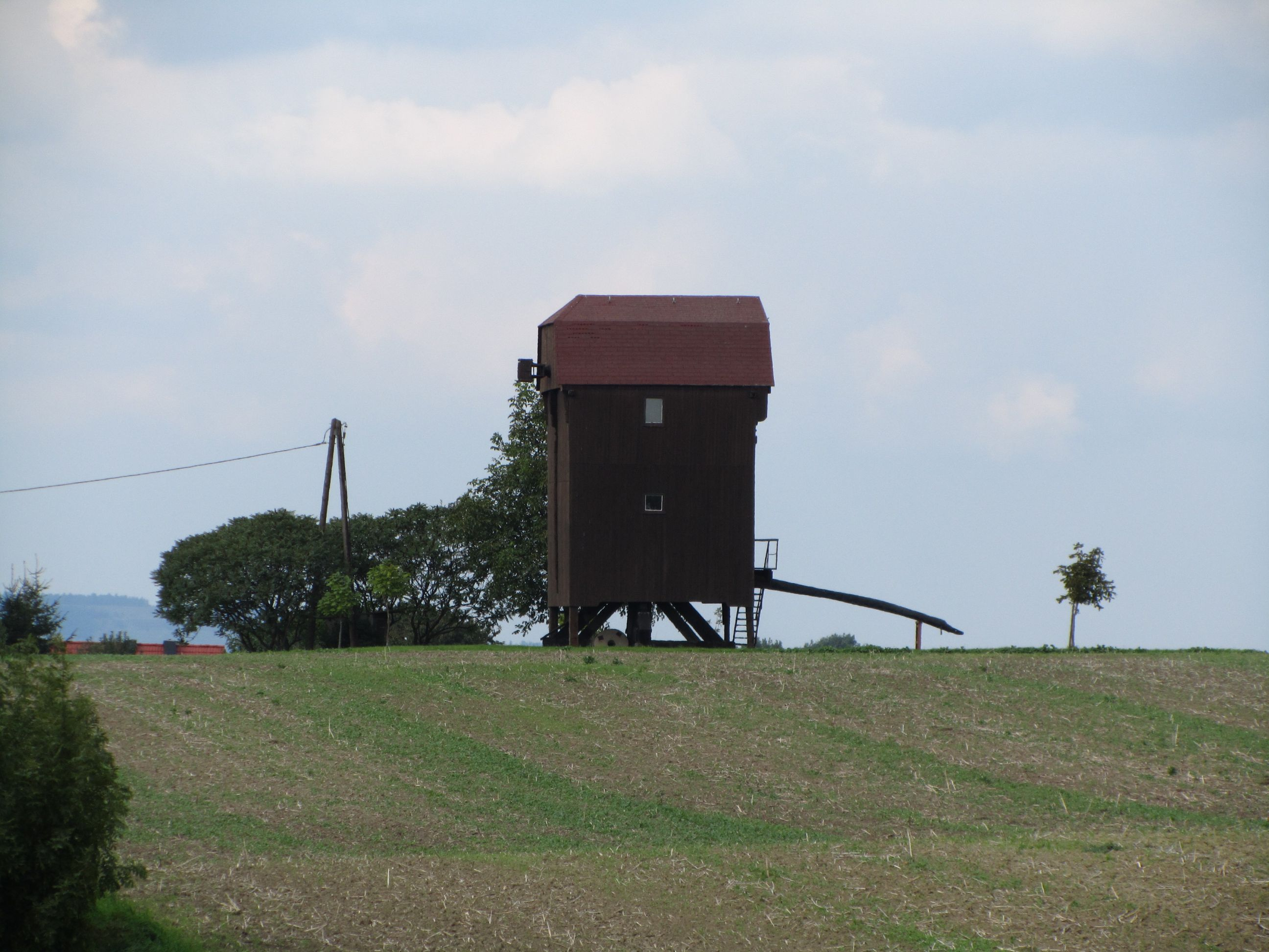 Pettstädt, Windmühle